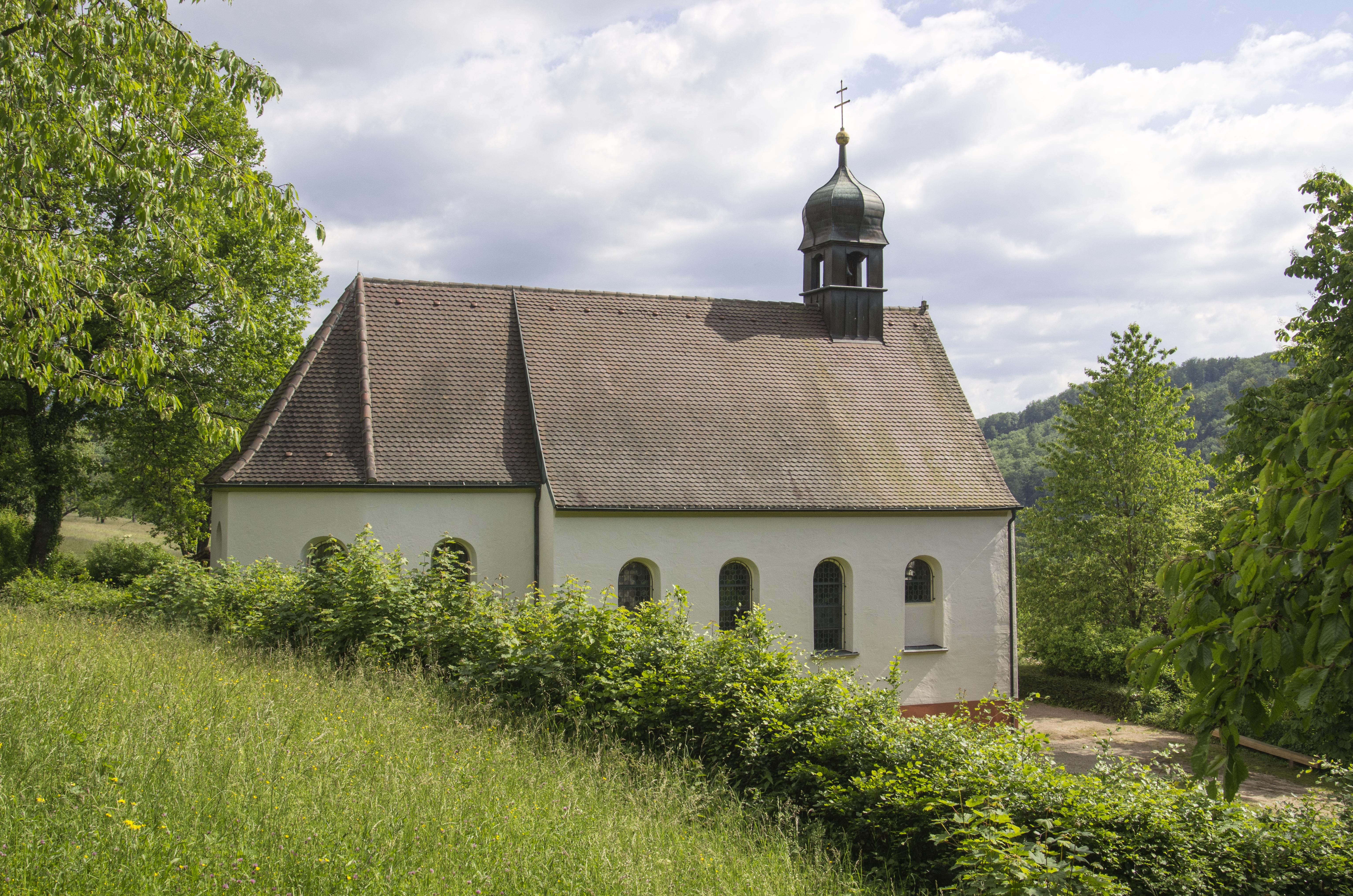 Bilder aus/von der Berghauser Kapelle im Naturschutzgebiet Berghauser Matten bei Ebringen